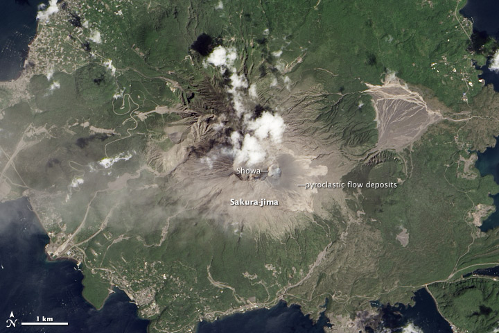 Sakurajima eruption as seen on August 18, 2013